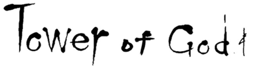 Tower of God - Logo Manhwa